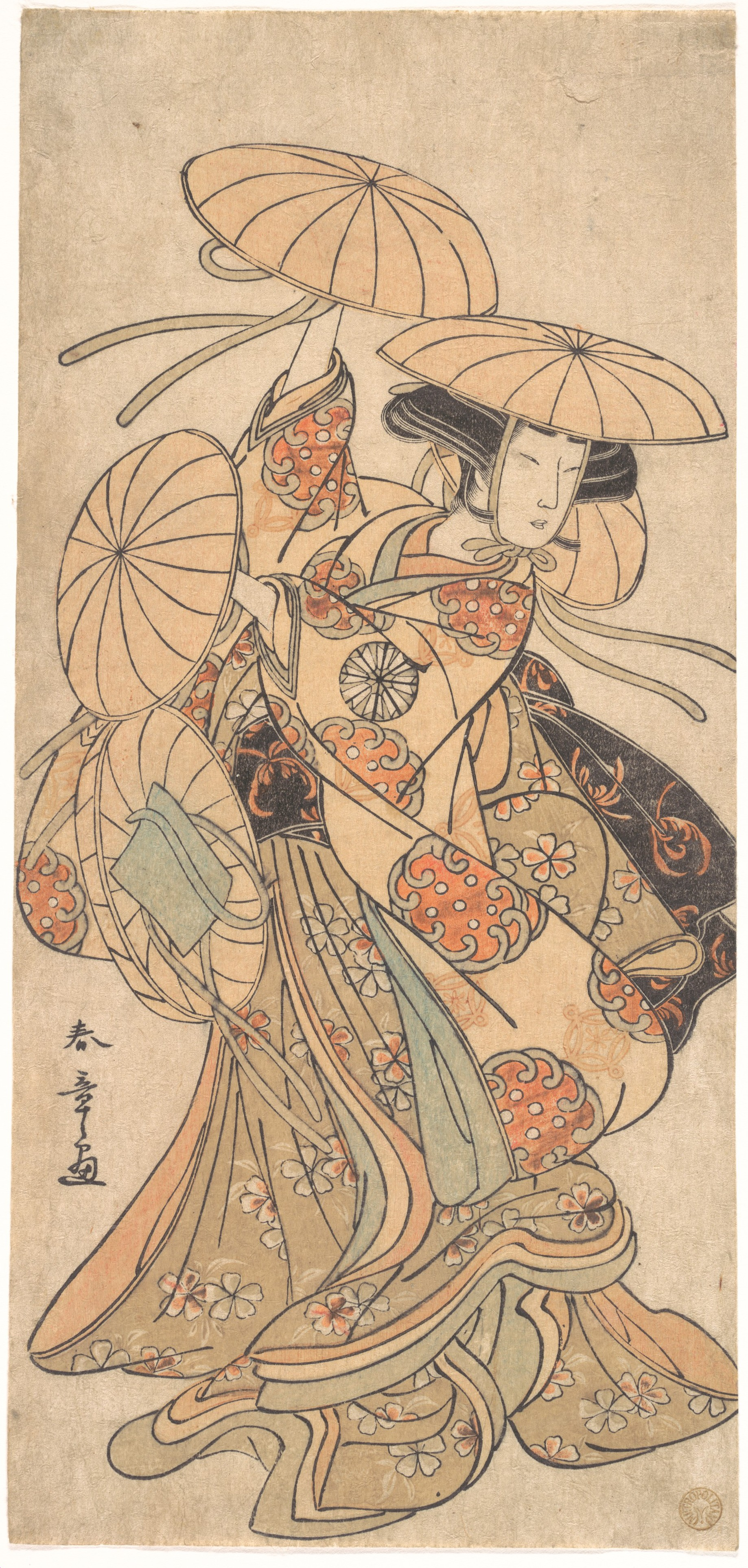 Nakamura Tomijūrō I in a Female Dance Role